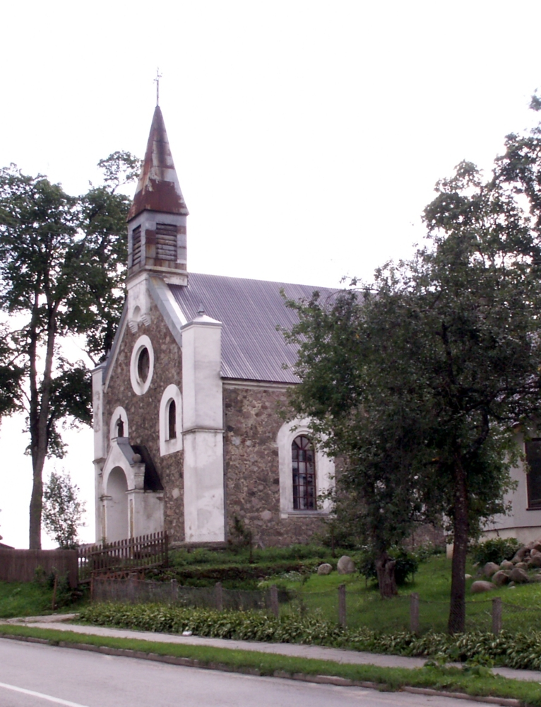 Švėkšnos evangelikų liuteronų bažnyčia